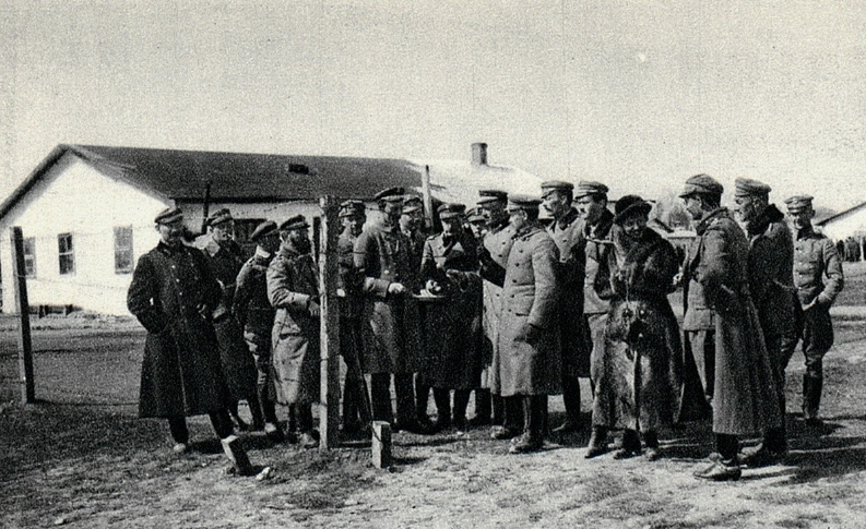 Wielkanoc w obozie internowania w Bustyahaza. Ks. kap. Franciszek Łuszczki trzyma talerz ze święconym jajkiem.